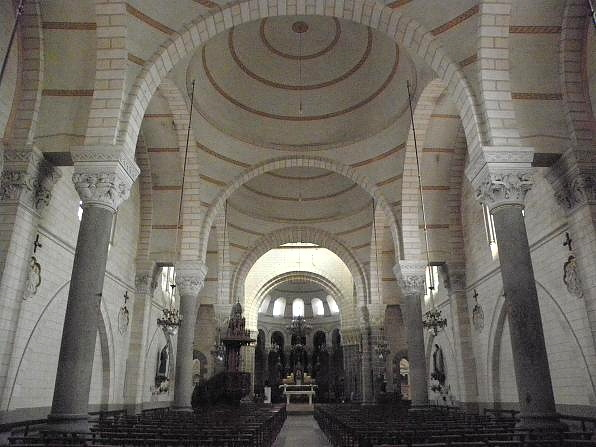 Intérieur de l'église Saint-Étienne de Val-d'Izé (35).